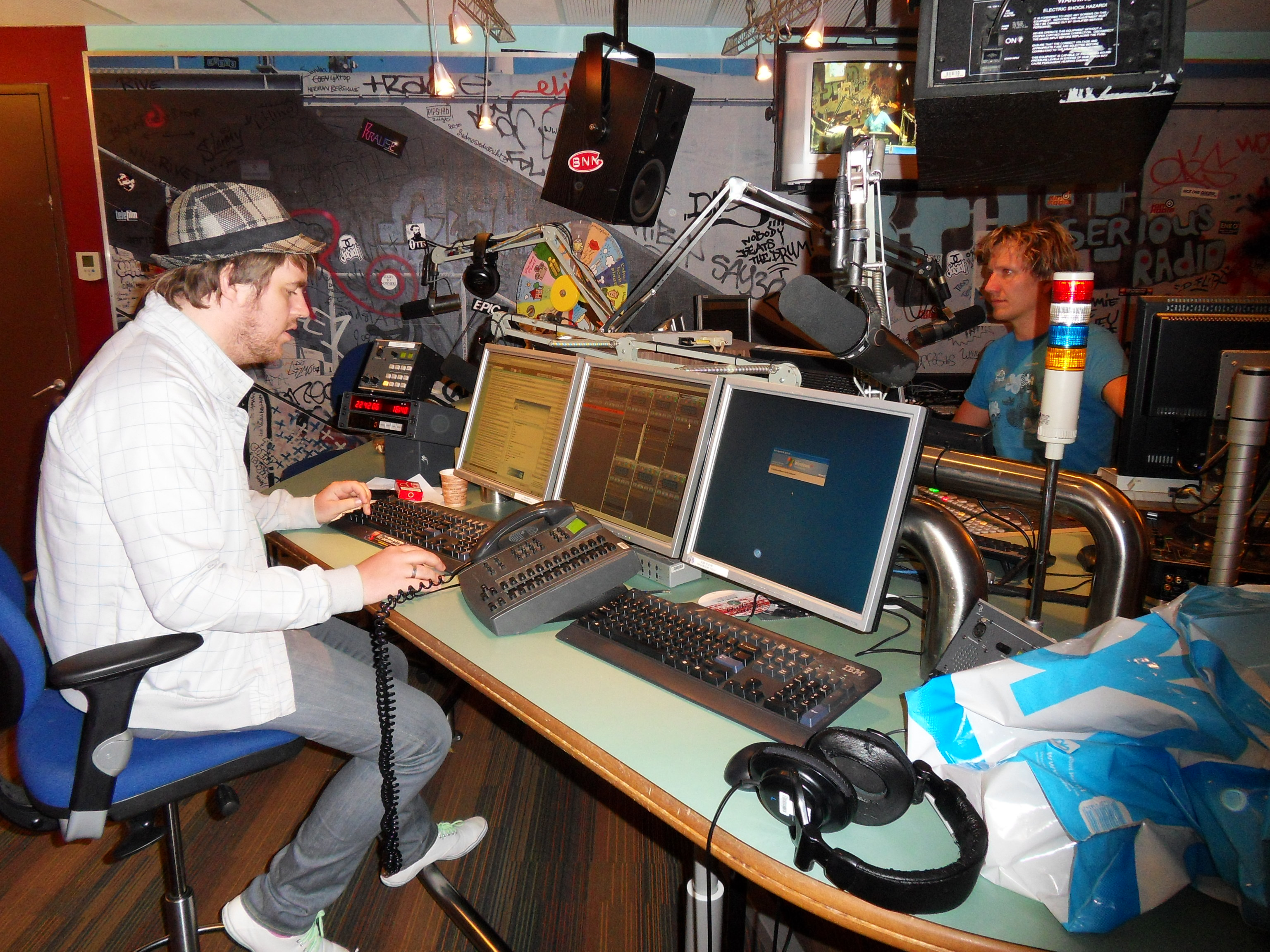 Foto genomen in de studio van 3FM.